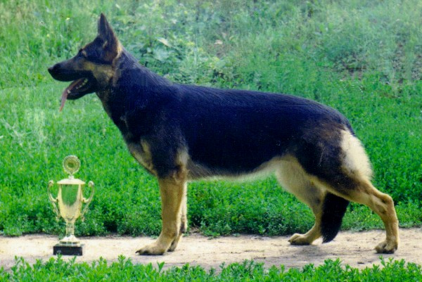 Восточноевропейская овчарка Чемпион России и Чемпион Породы.Фото Митхеевой Е.